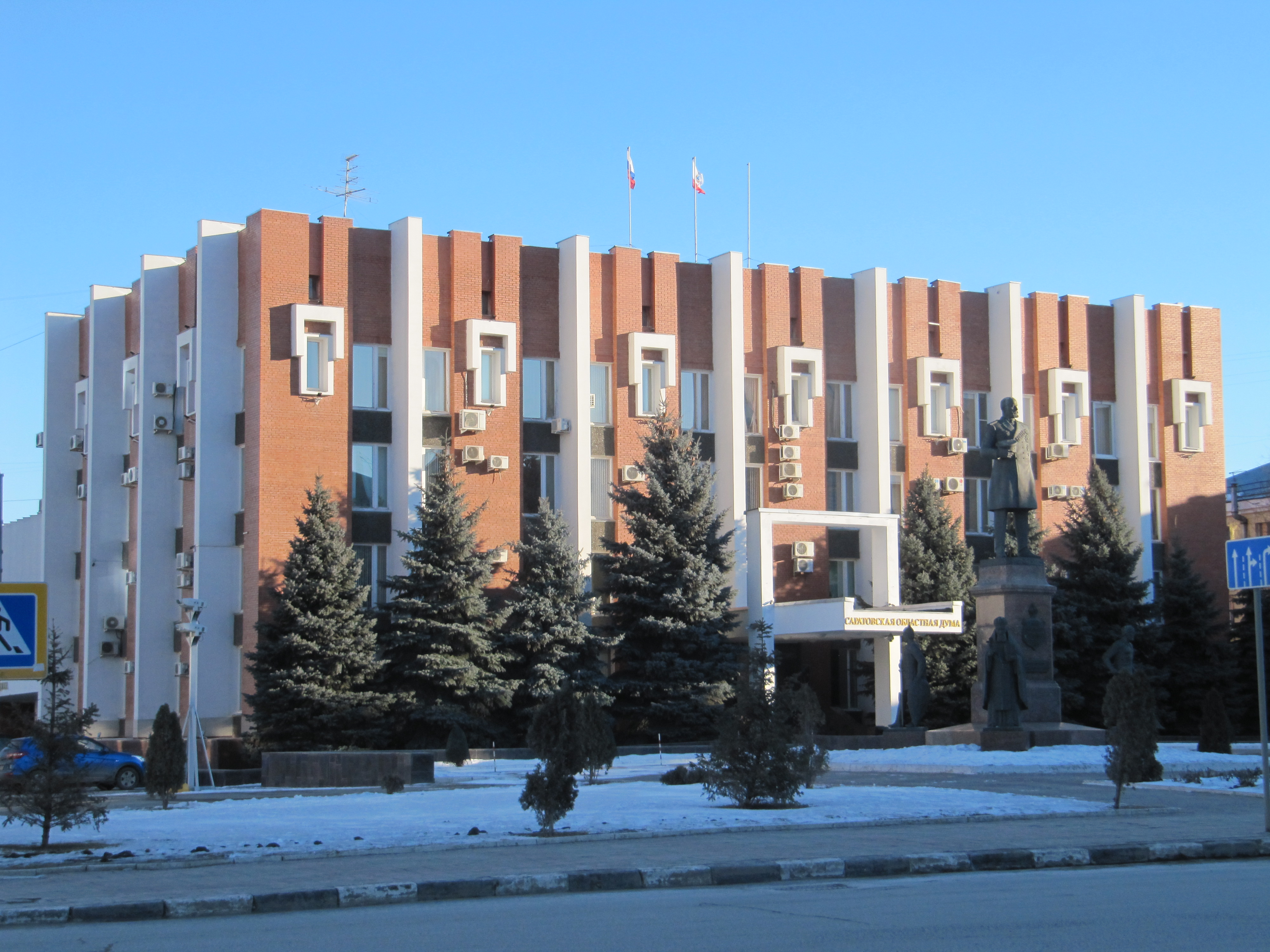 Саратовская областная дума. Угол ул. Радищева и ул. Первомайская. Саратов. Перед фасадом памятник Столыпину П.А.